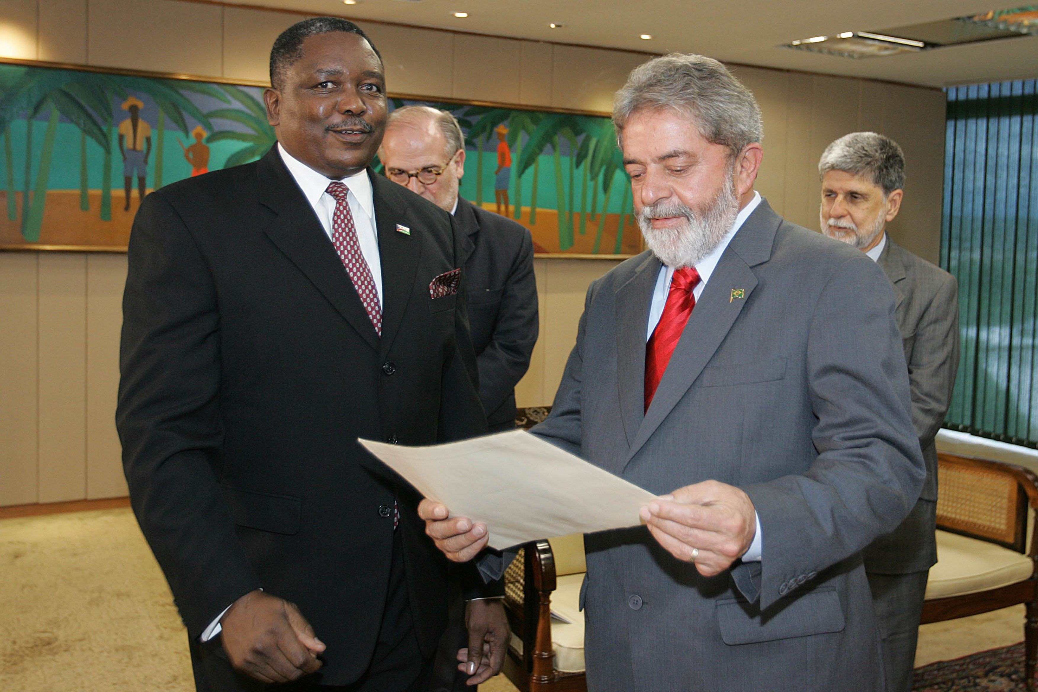 Brasília - O presidente Luiz Inácio Lula da Silva recebe carta credencial do novo embaixador da República da Namíbia, Hopelong Ushona Ipinge, no Palácio do Planalto.